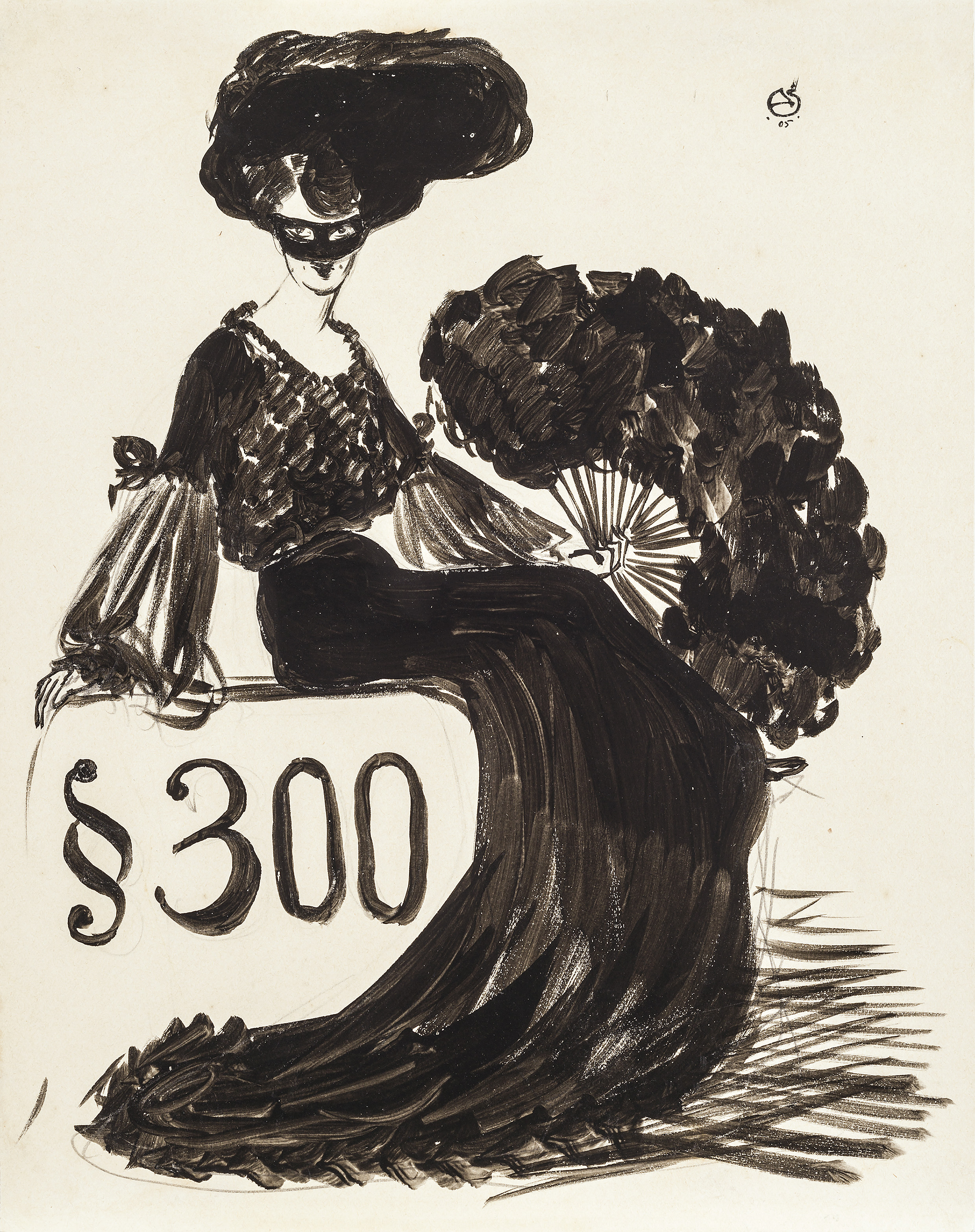 Alexander von Salzmann: §300. Tusche über Bleistift auf Karton, 27,5 x 21,5 cm, rechts oben monogrammiert und datiert